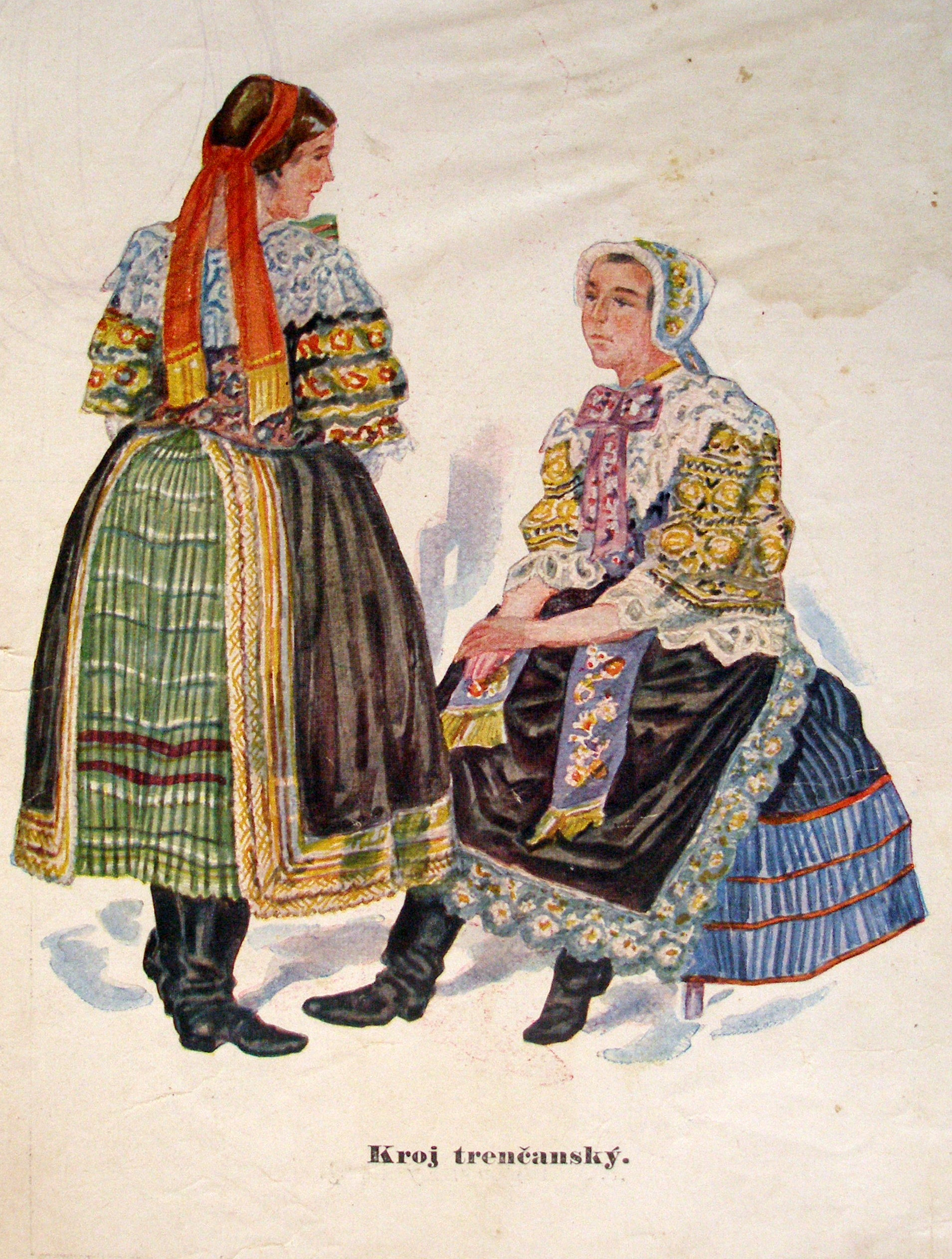 Digitalizovaný obrázok- detail z knihy Praktická hospodyňka napísanej v češtine, z obdobia existencie 1. Československej republiky. Rok vydania knihy 1929.